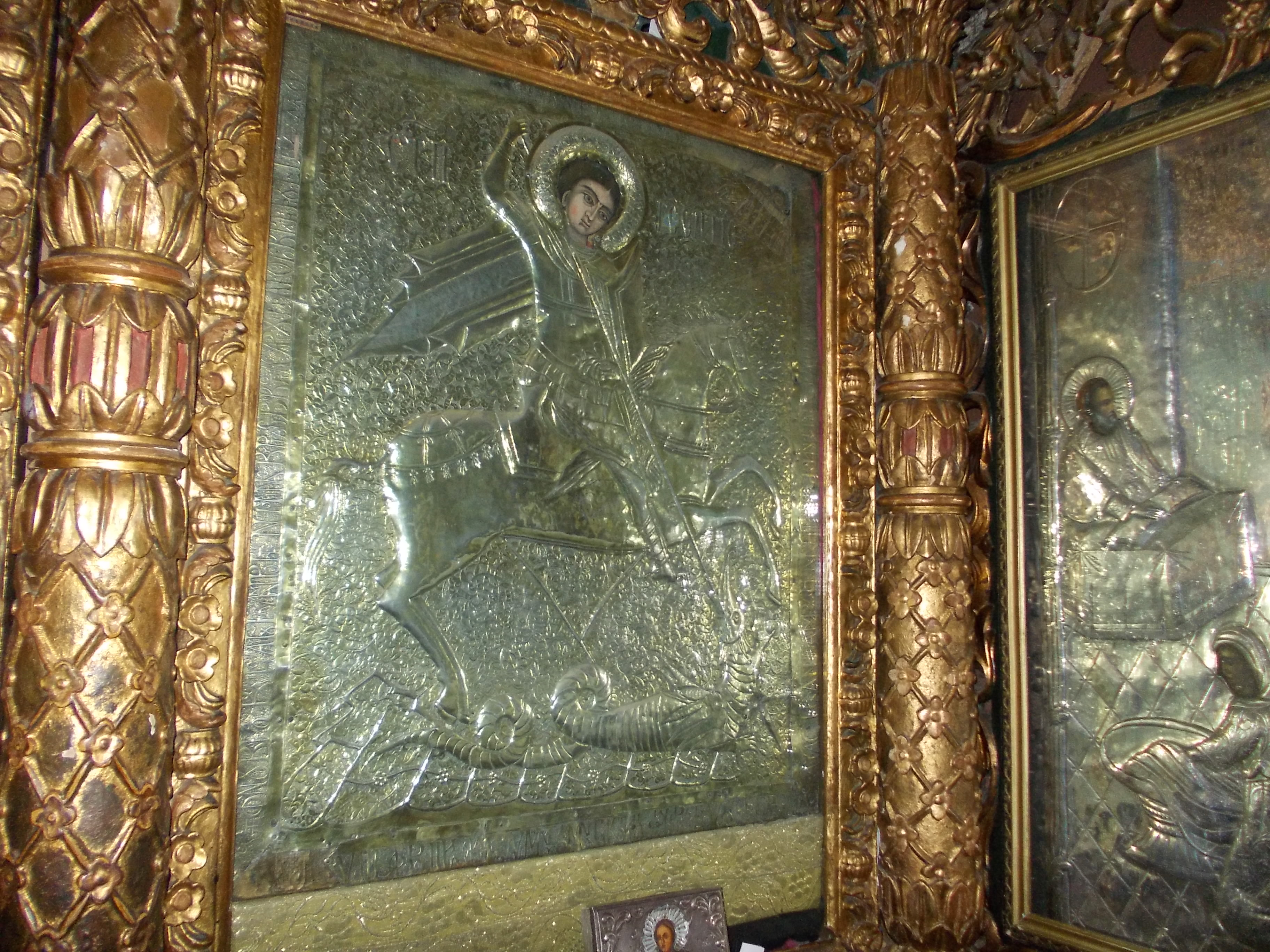 Biserica "Nașterea Maicii Domnului", "Sf. Gheorghe" 01